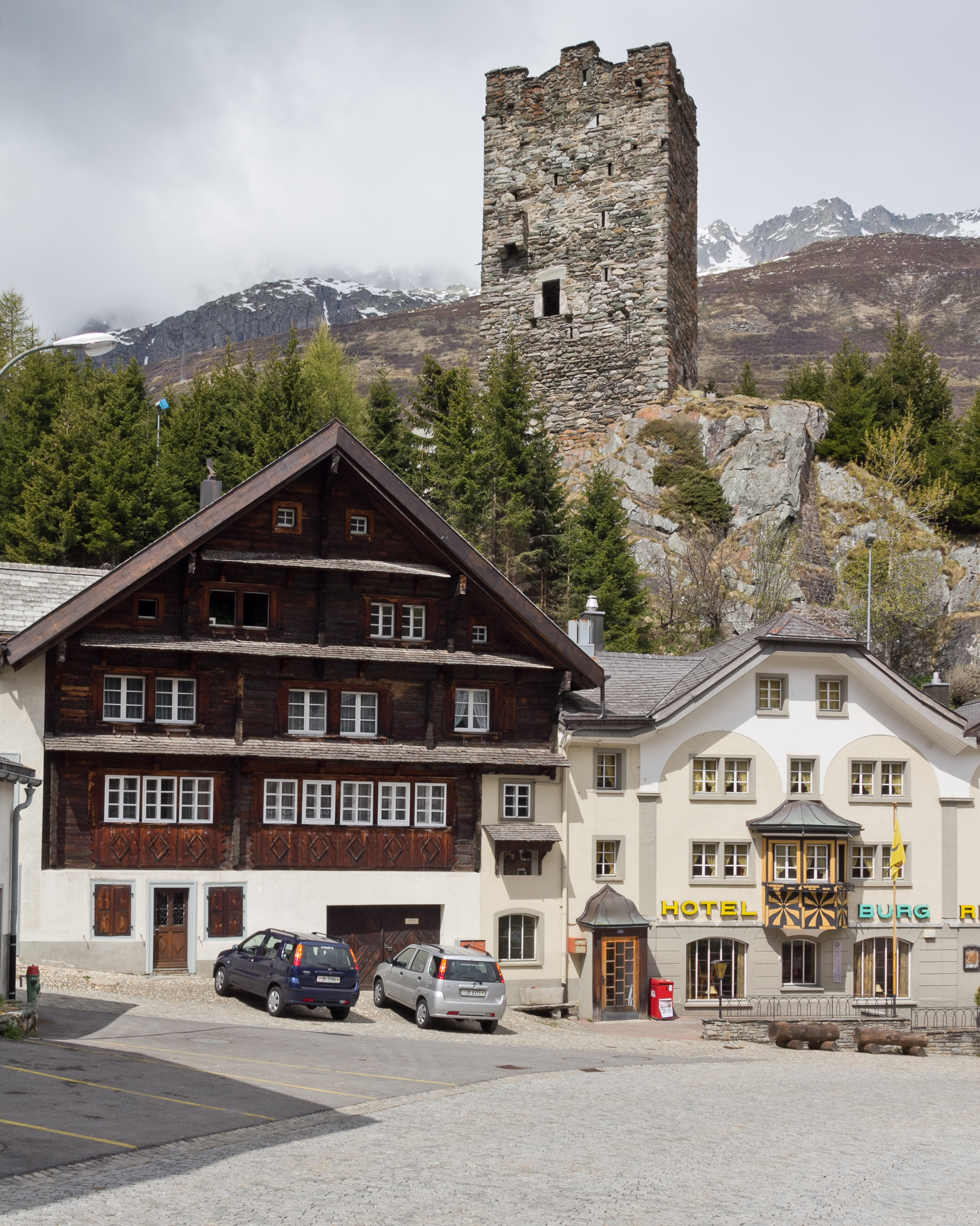 Burg und Hotel Hospental UR, Schweiz